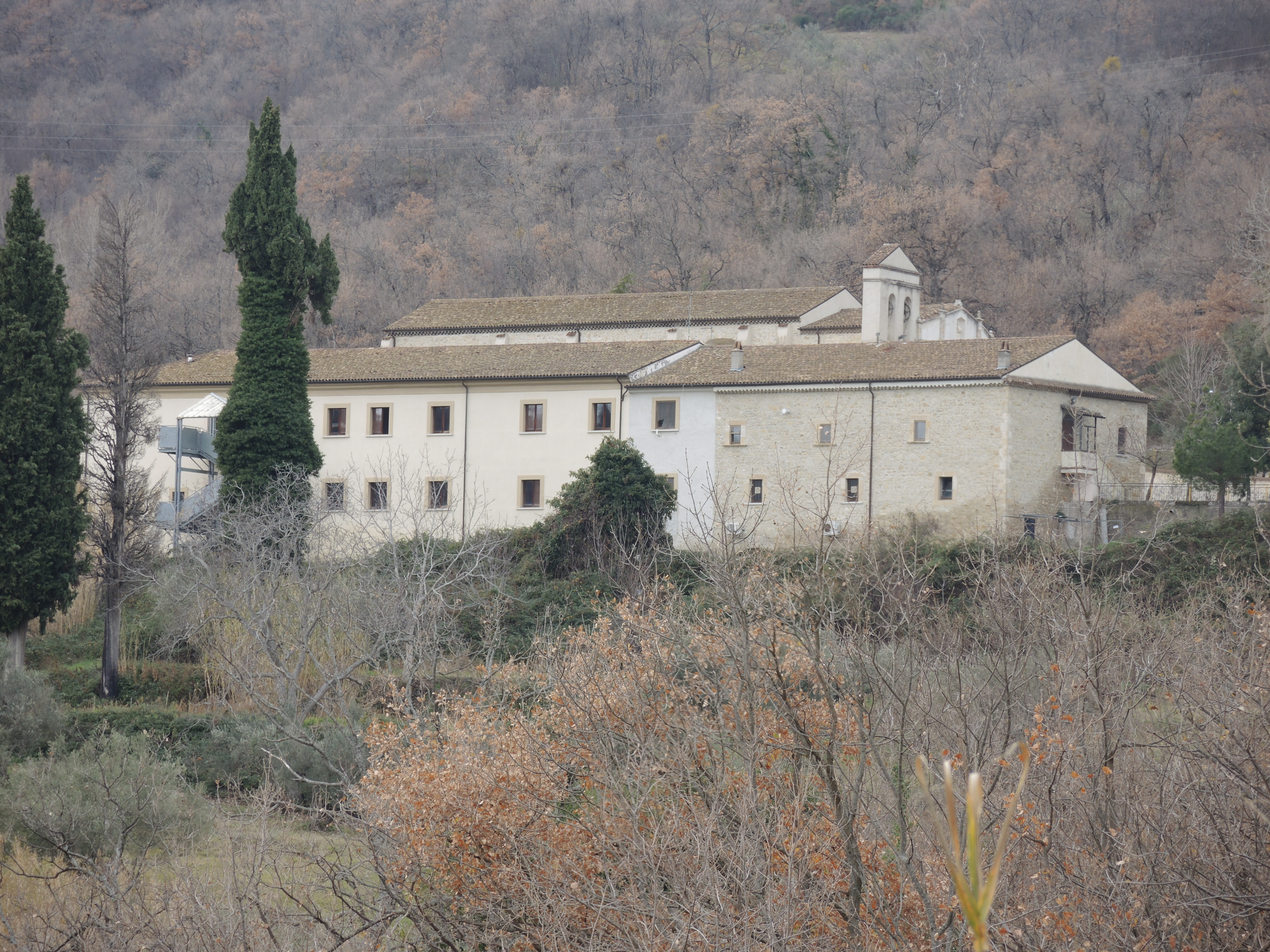 San Buono: Convento di Sant'Antonio